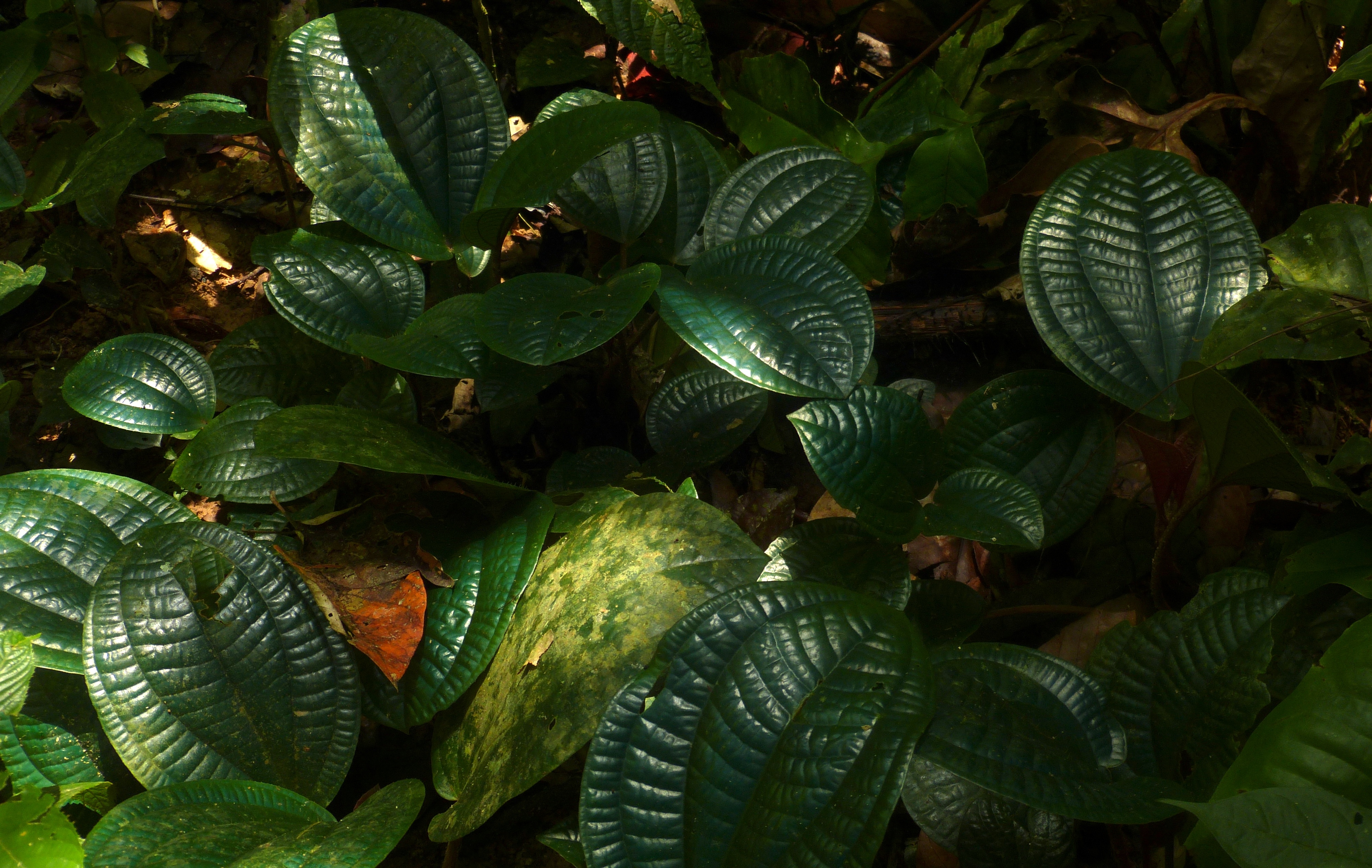 Taman Negara NP, Pahang, MALAYSIA